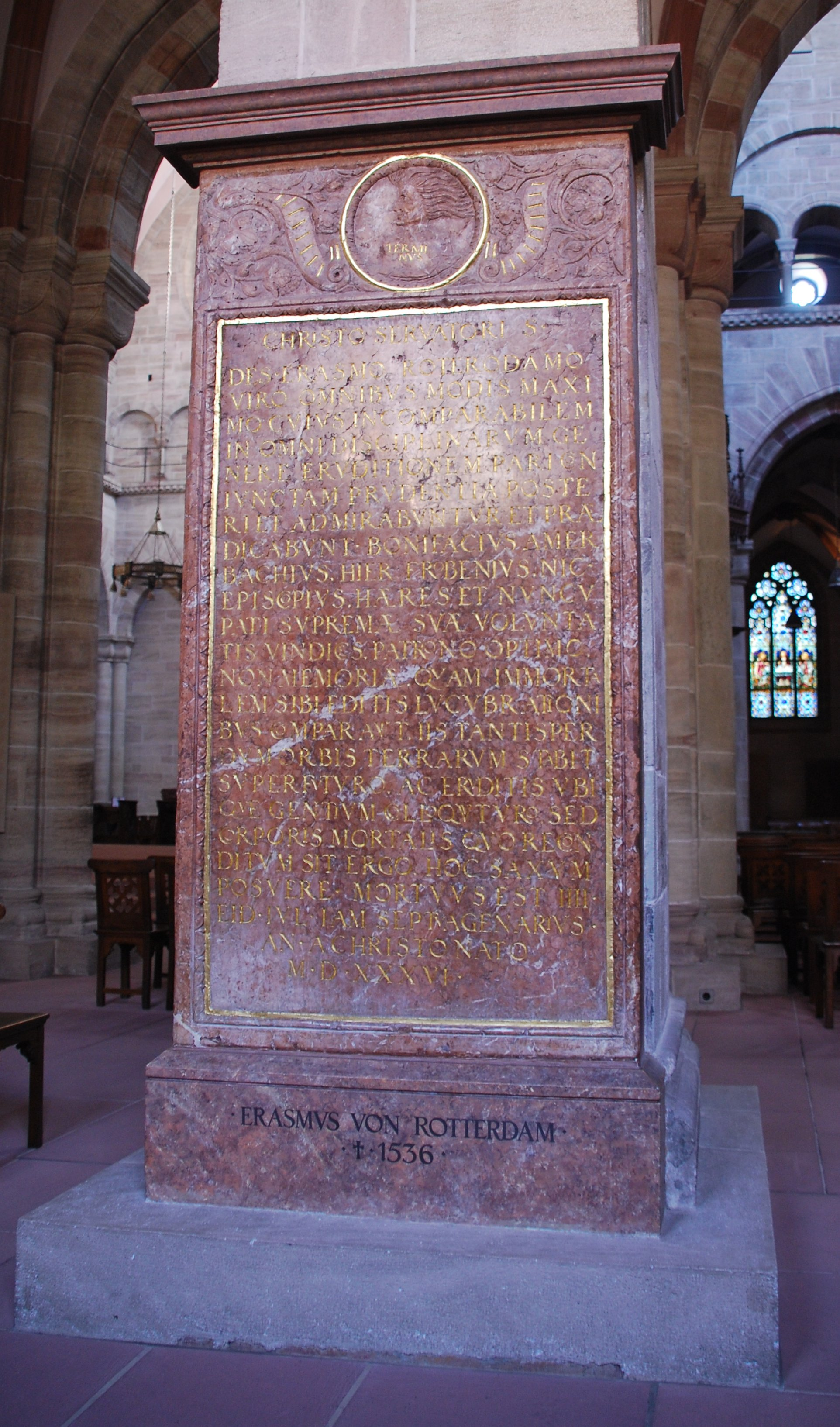 Erasmus-Epitaph im Basler Münster